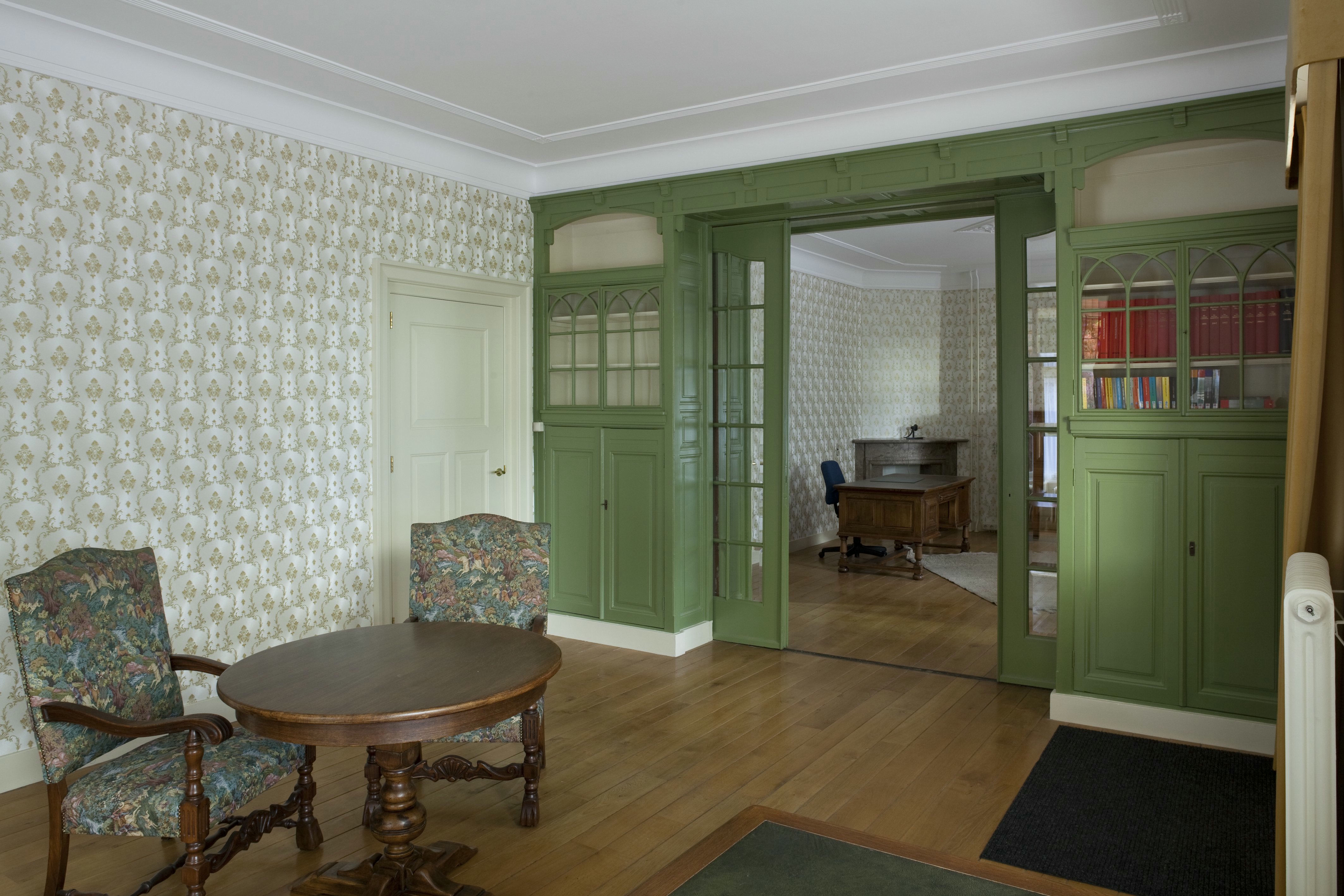 De Nijhorst: Interieur kamer en-suite links voor, zicht naar rechts voor